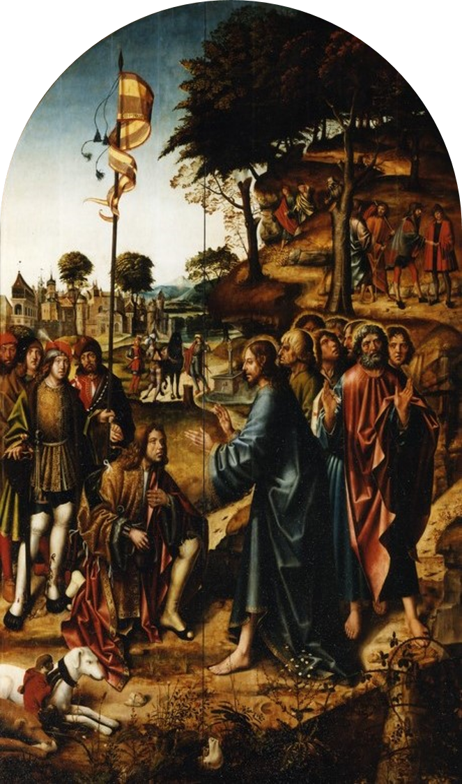 Jesus e o centurião por Jorge Afonso. Uma das pinturas da Charola do Convento de Cristo, Tomar, Portugal pintadas depois de 1510.